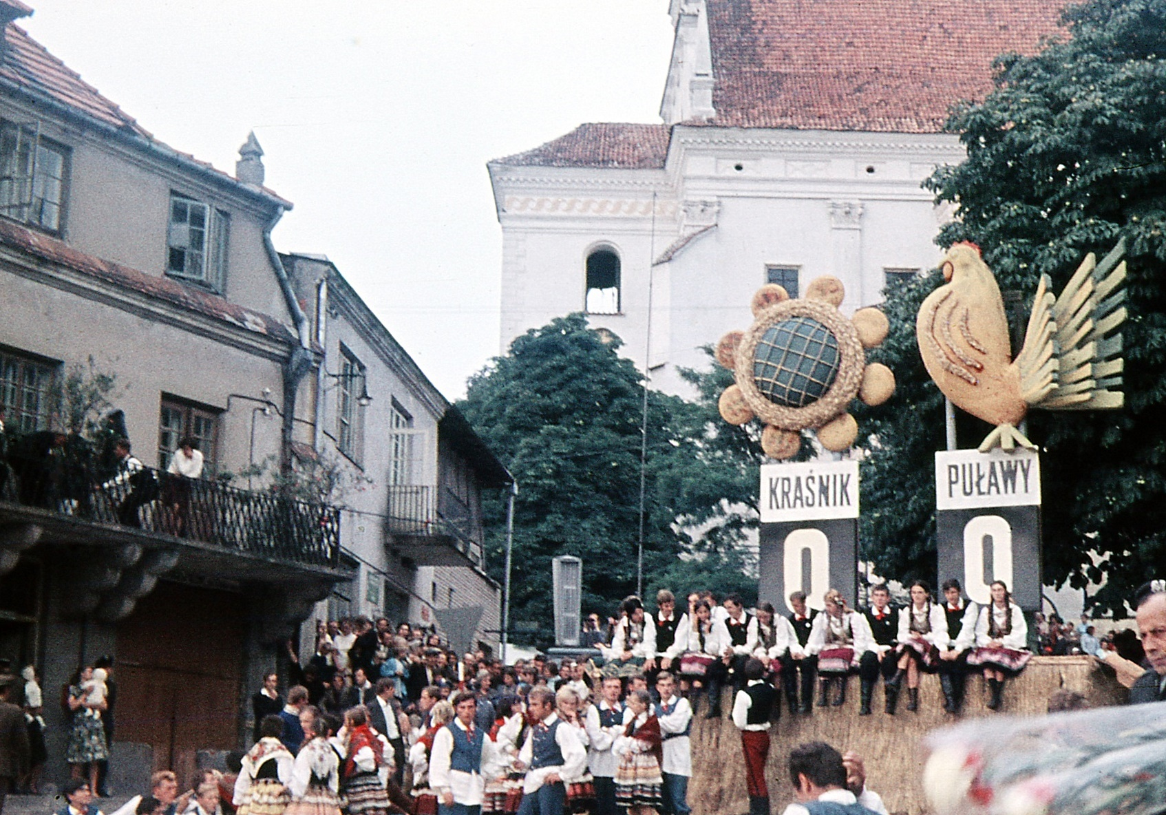 Turniej Miast, lato 1968: Kraśnik-Puławy; scena ustawiona w Kazimierzu Dolnym.